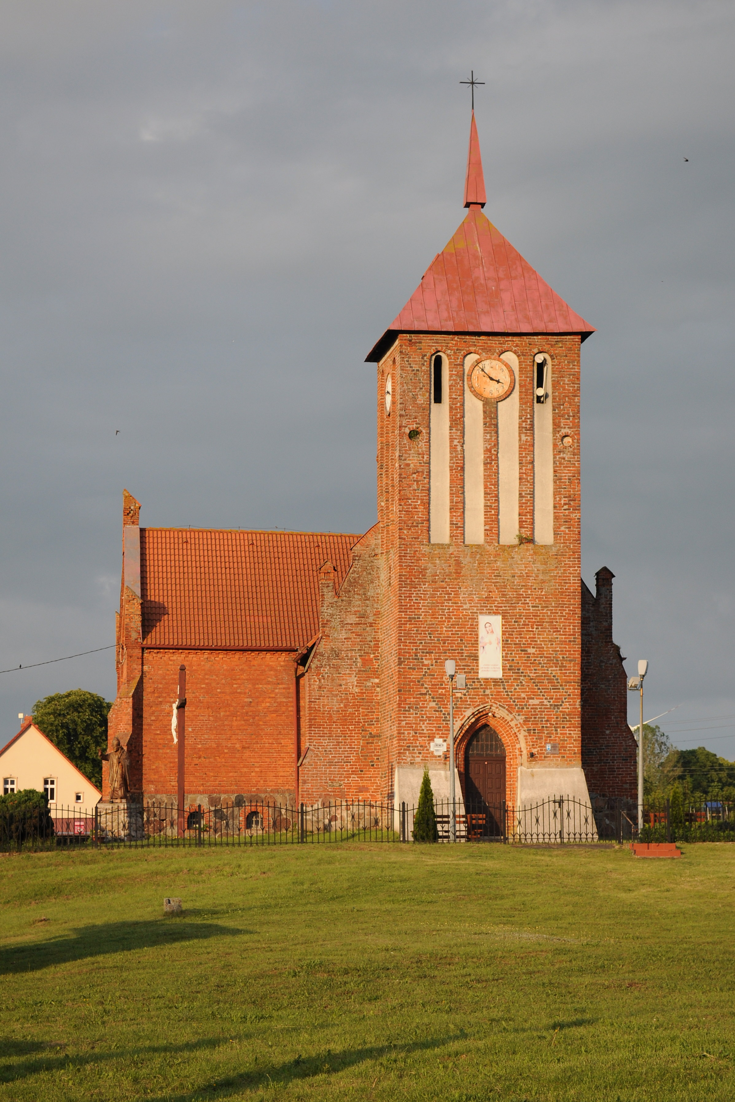 Tychowo - rzymskokatolicki kościół filialny p.w. Matki Boskiej Królowej Polski, XIV, 2 poł. XIX.